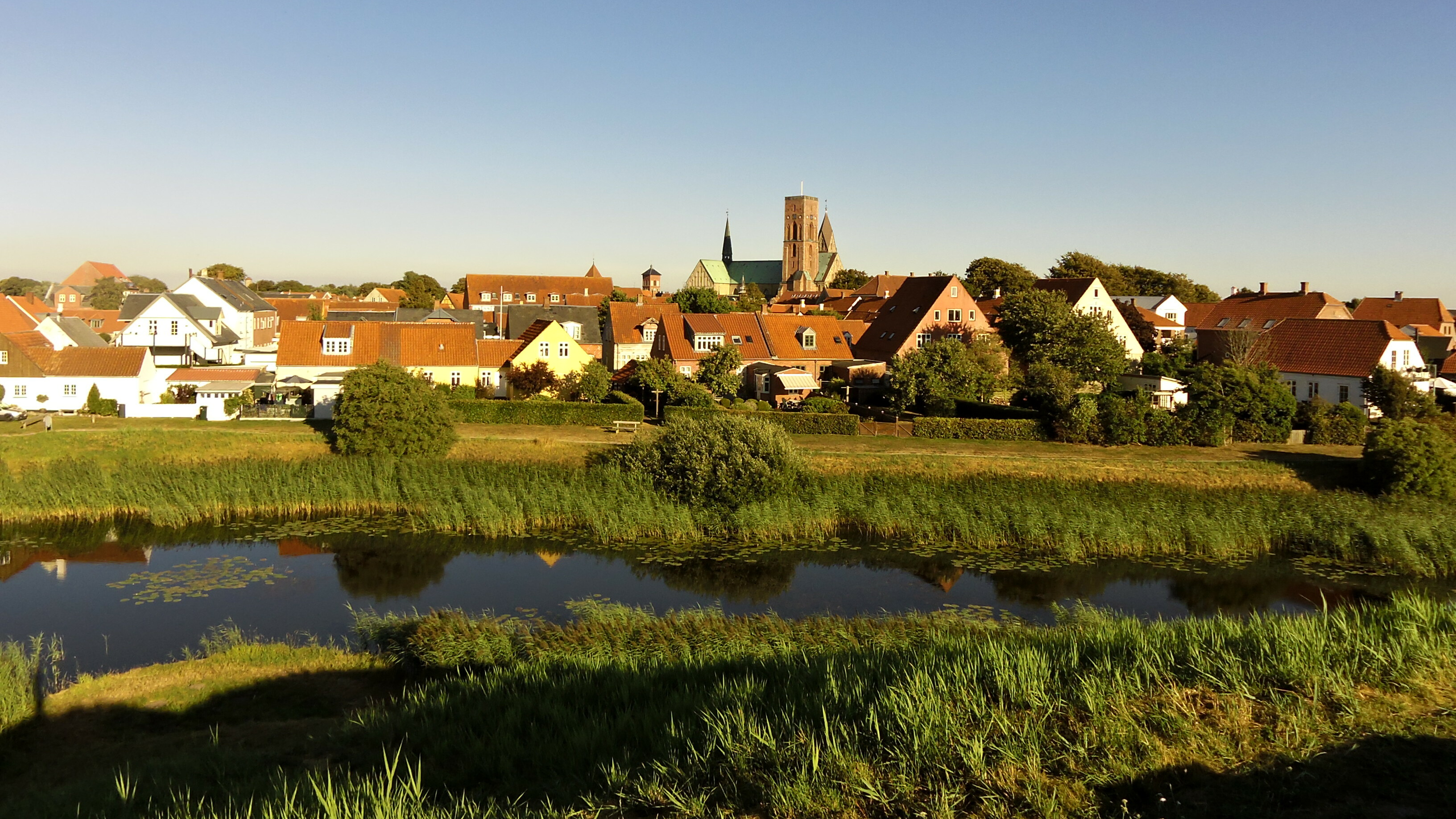 Vue ind over Ribe fra Slotsbanken